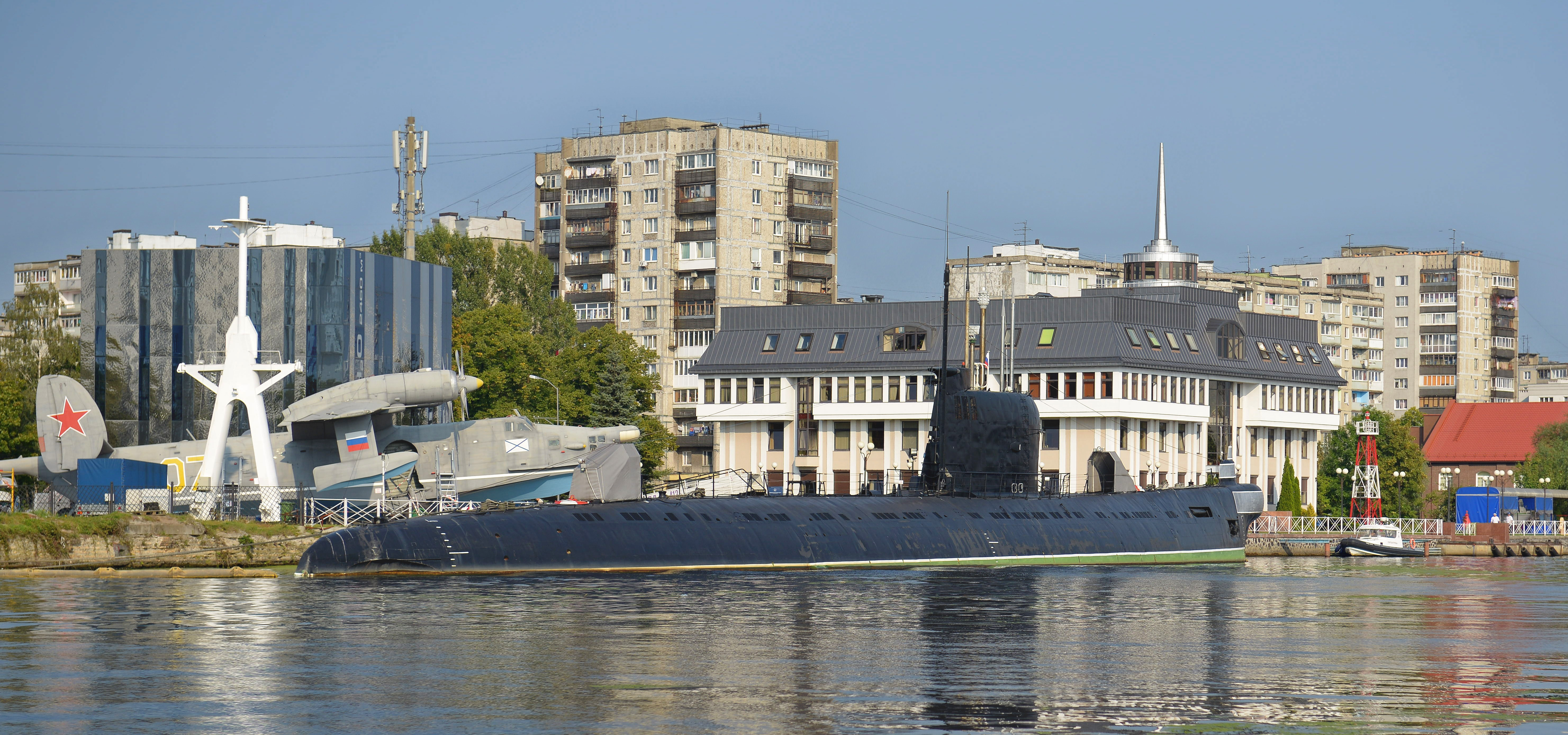 Подводная лодка "Б-413": набережная Петра Великого, 1 (Музей Мирового океана), Калининград, Калининградская область